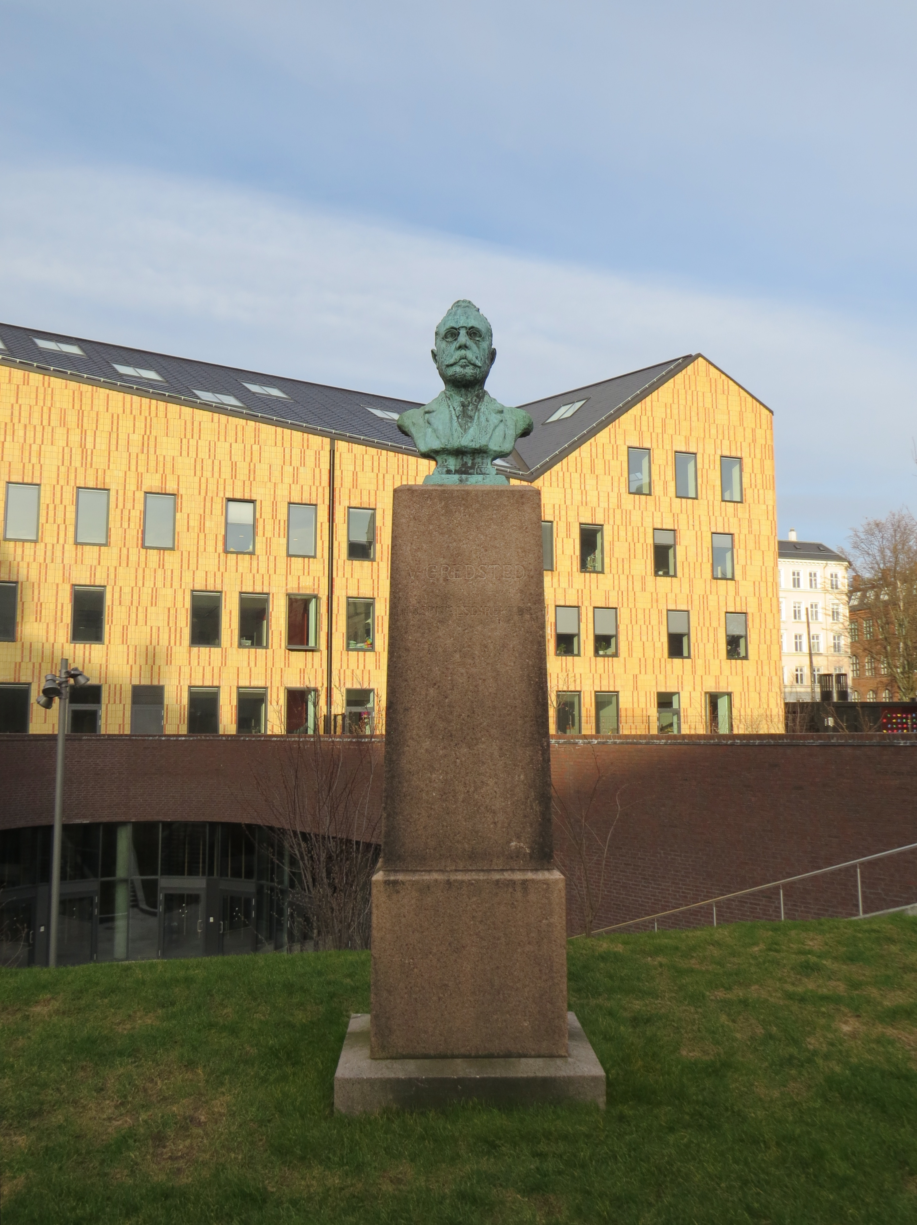 Buste forestillende hospitalsdirektør H.V.S. Gredsted (1848-1910), af Helen Dohlmann (1870–1942), Kommunehospitalet, København